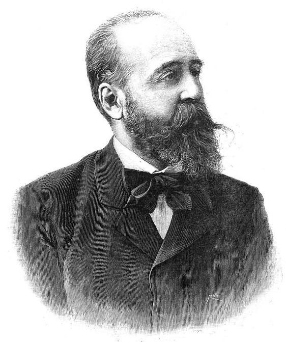 Retrato de Segismundo Moret, en la revista española La Ilustración Española y Americana.